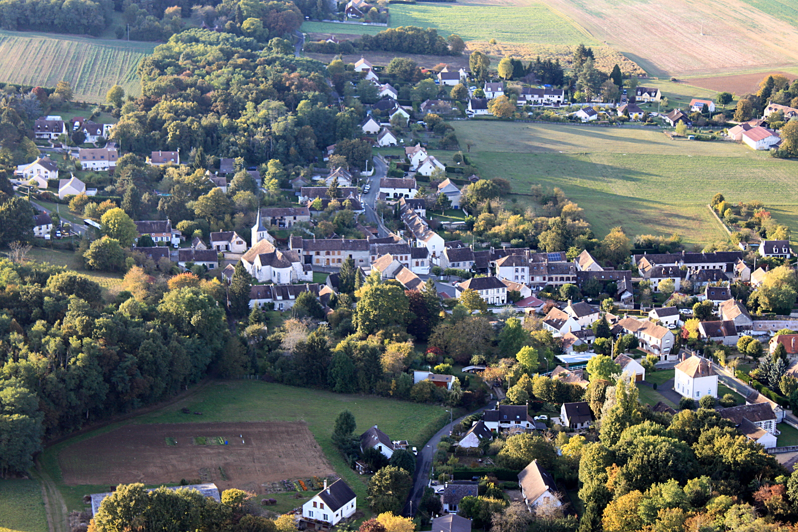 Villemaréchal - le bourg